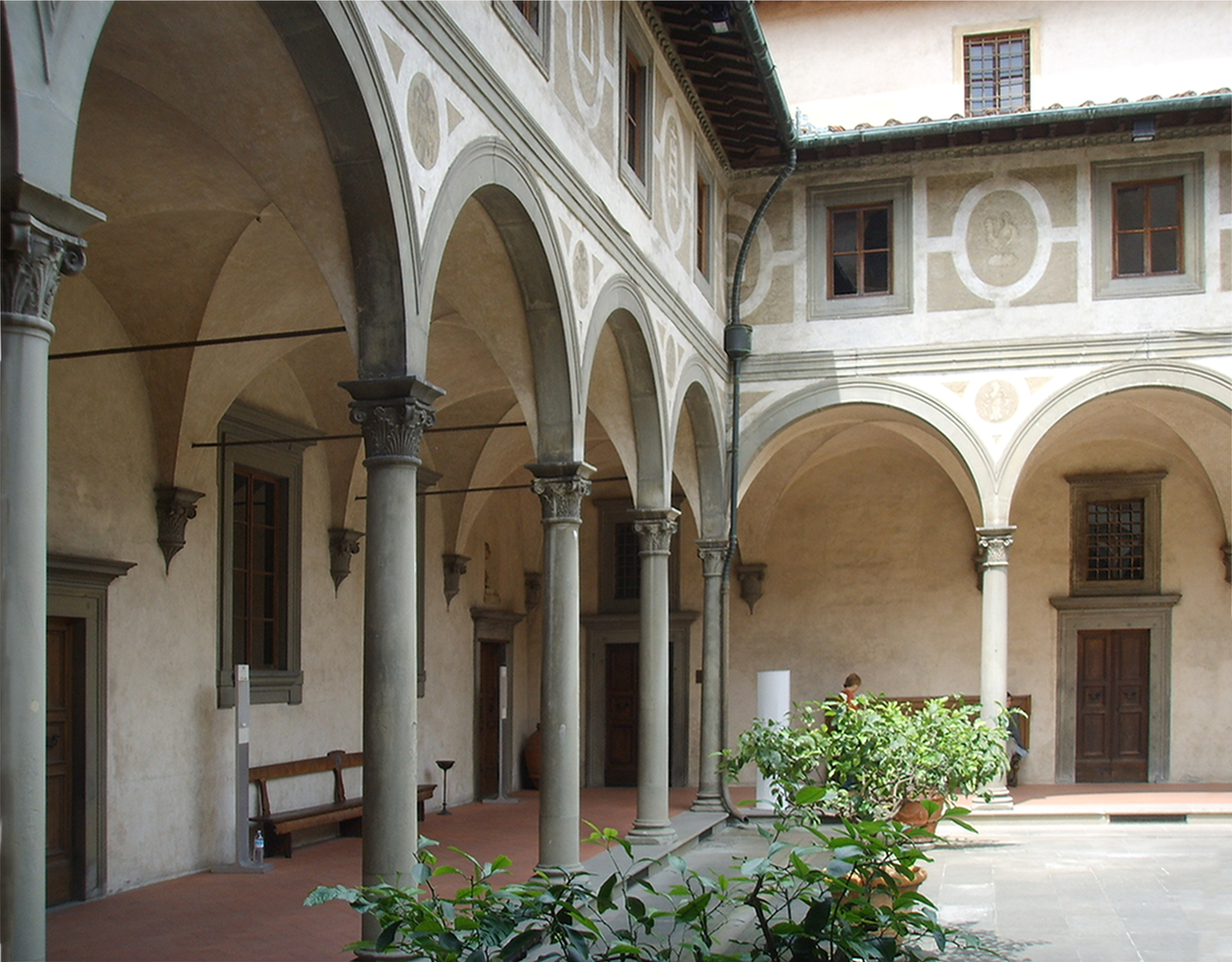 Ospedale degli innocenti, primo chiostro2